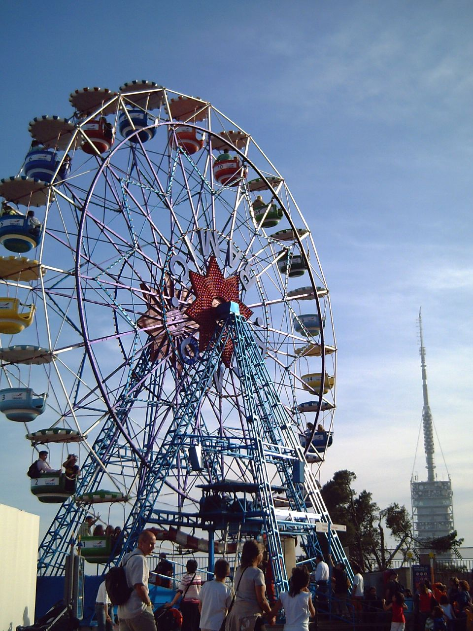 Al-Bawadi Park. National Sharaan Group..